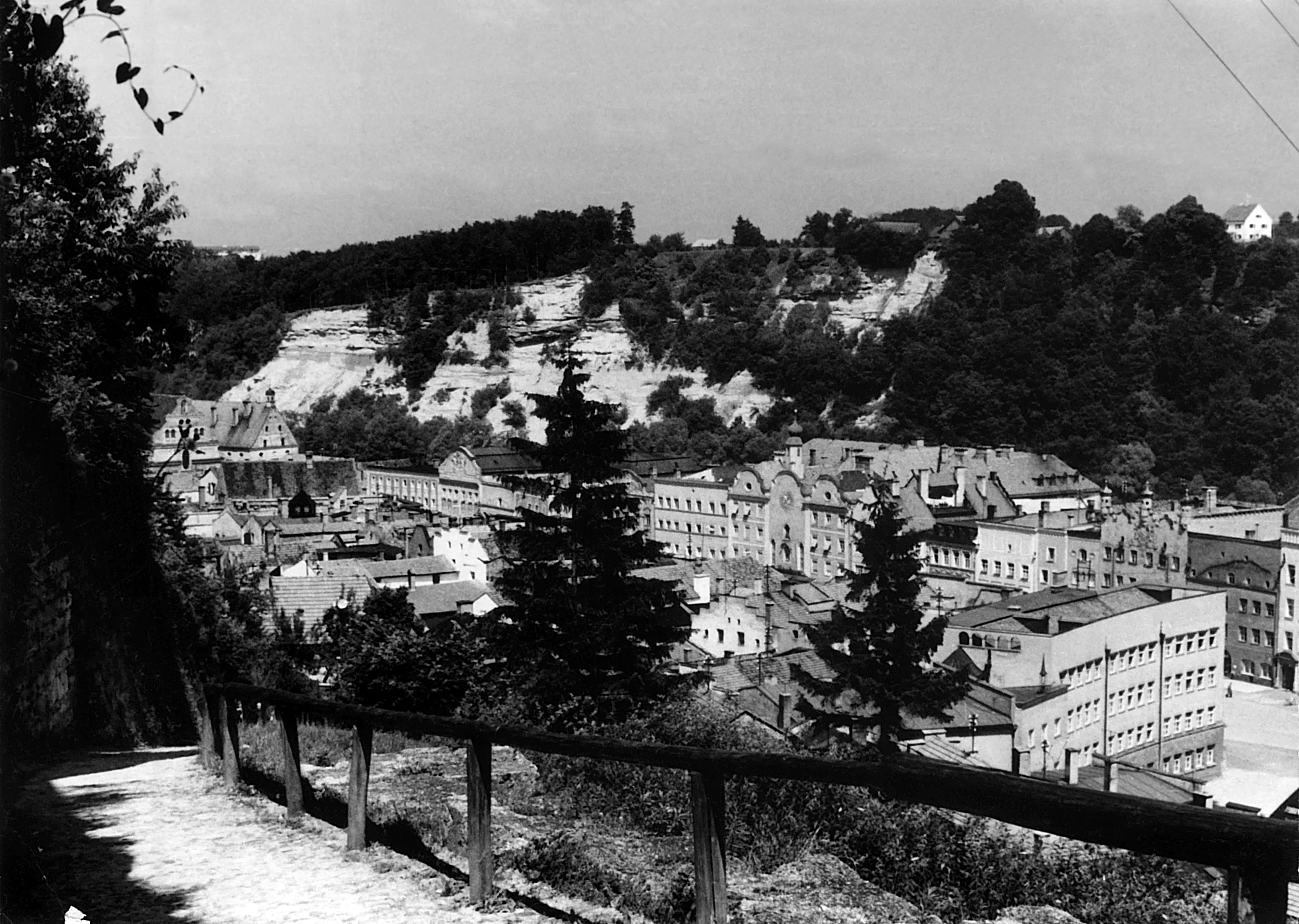 Burghausen – Blick vom Burgsteig auf die historische Altstadt, Juli 1956. Im Juli 1956 veranstalteten zwei Lehrerinnen der Mädchenschule meiner Mutter einen letzten Ausflug vor dem Ende der Schulzeit in der Pasinger Mädchenmittelschule der Englischen Fräulein. Dieser führte mit der Bahn von Pasing aus – mit Umstieg in Mühldorf – nach Burghausen in die damalige Jugendherberge auf der Burg. Zum Programm gehörte ein sechsstündiger Fußmarsch der Mädchen nach Tittmoning. Am Donnerstag, 19. Juli 1956 endete das Schuljahr.